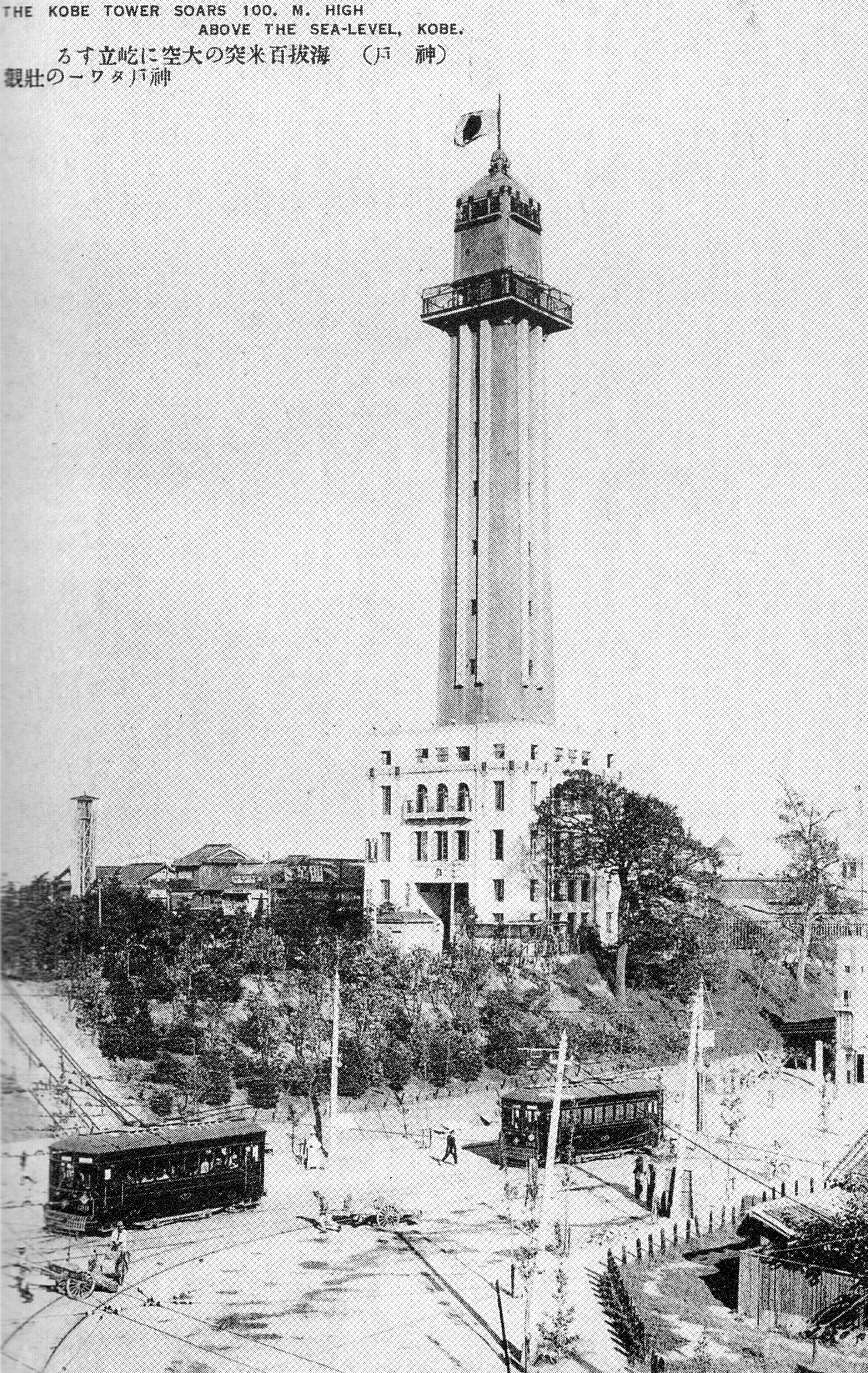 広告塔になる前の神戸タワーが印刷された絵葉書。